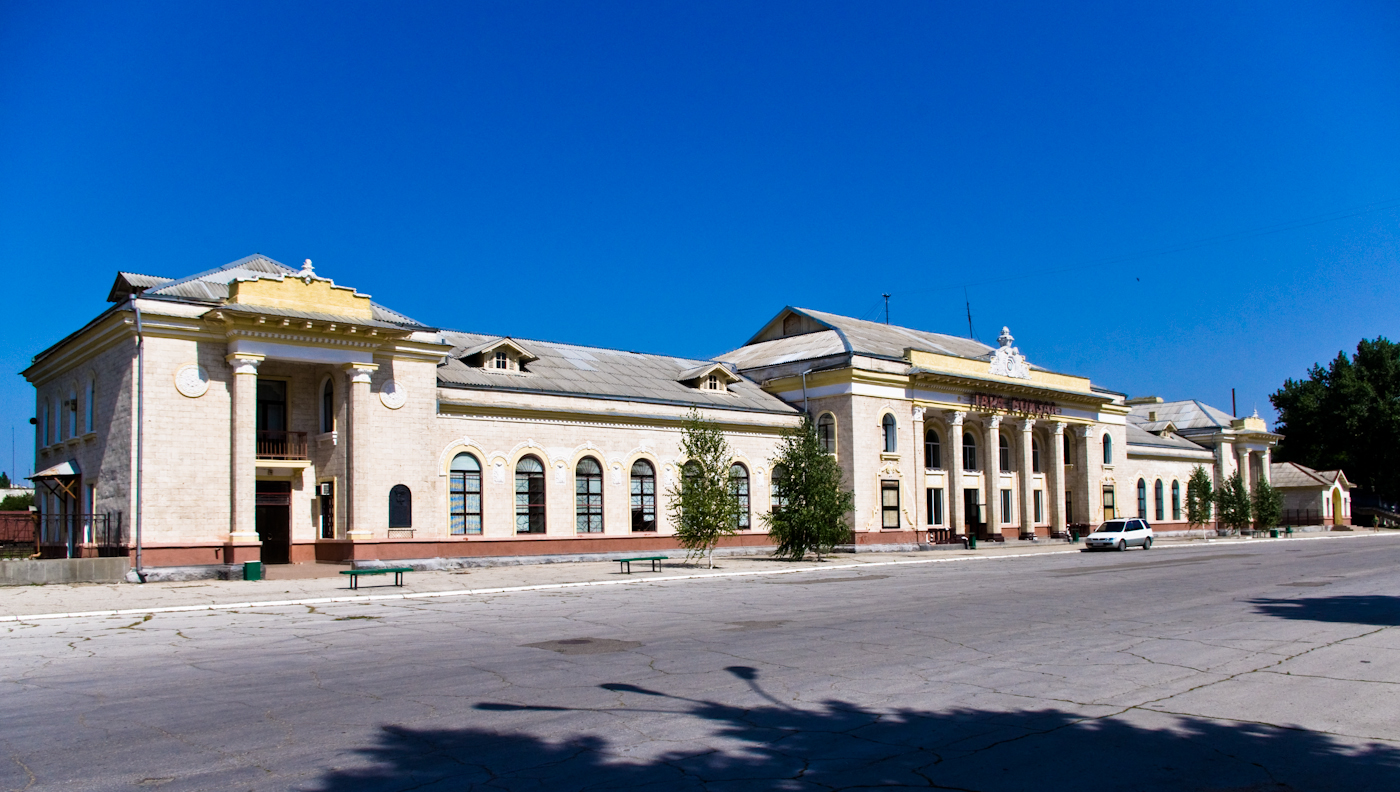 Станция Бендеры 1 - вокзал и площадь